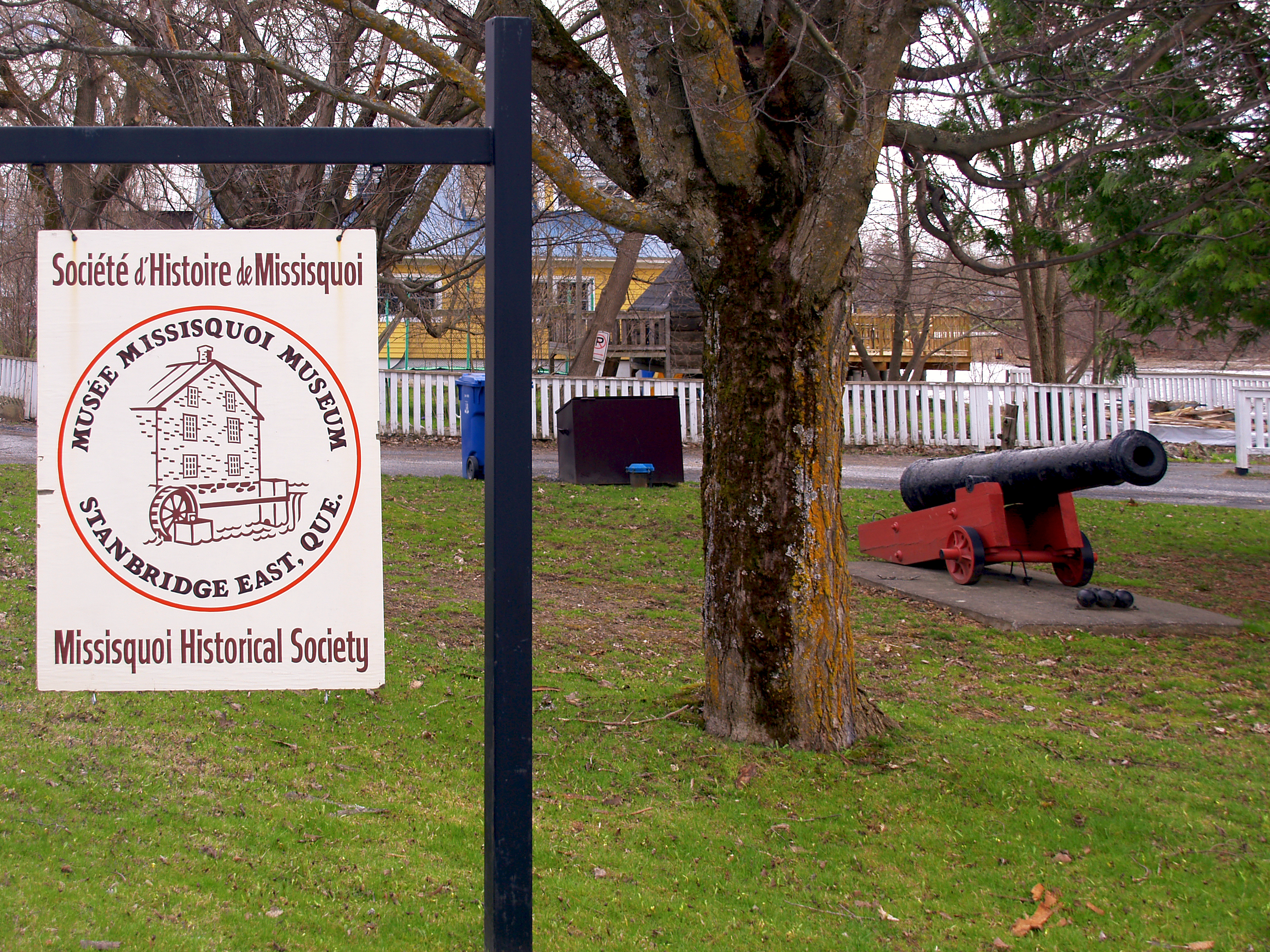 Stanbridge East - Musée Missisquoi Museum